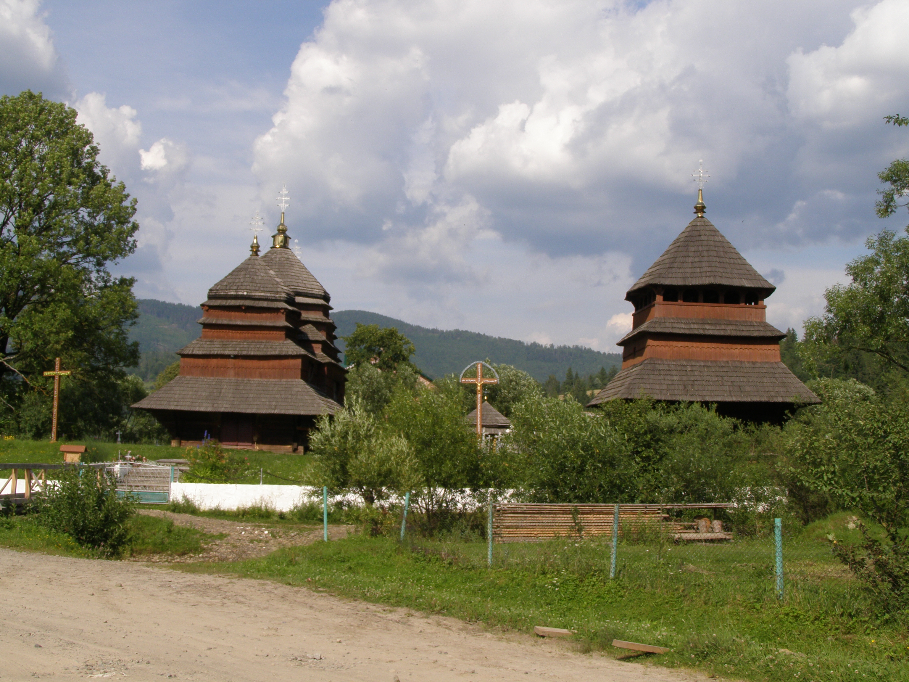 Церква Зіслання Святого Духа (1804) і дзвіниця. Село Верхня Рожанка. Фольклористична експедиція "Бойківщина – 2018" Кафедри української фольклористики Львівського університету імені Івана Франка